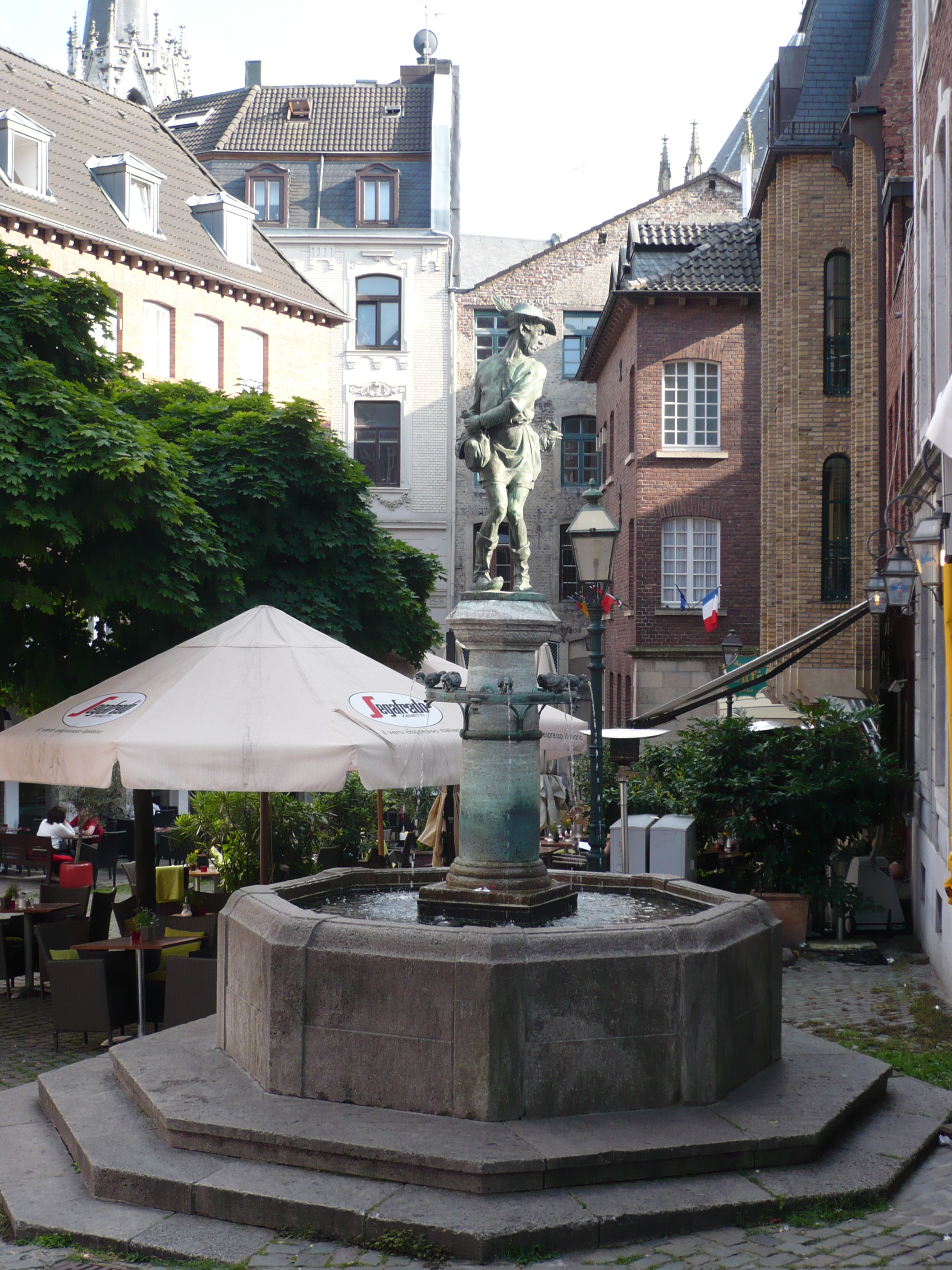 Hühnerdieb, Hermann Joachim Pagels, 1913